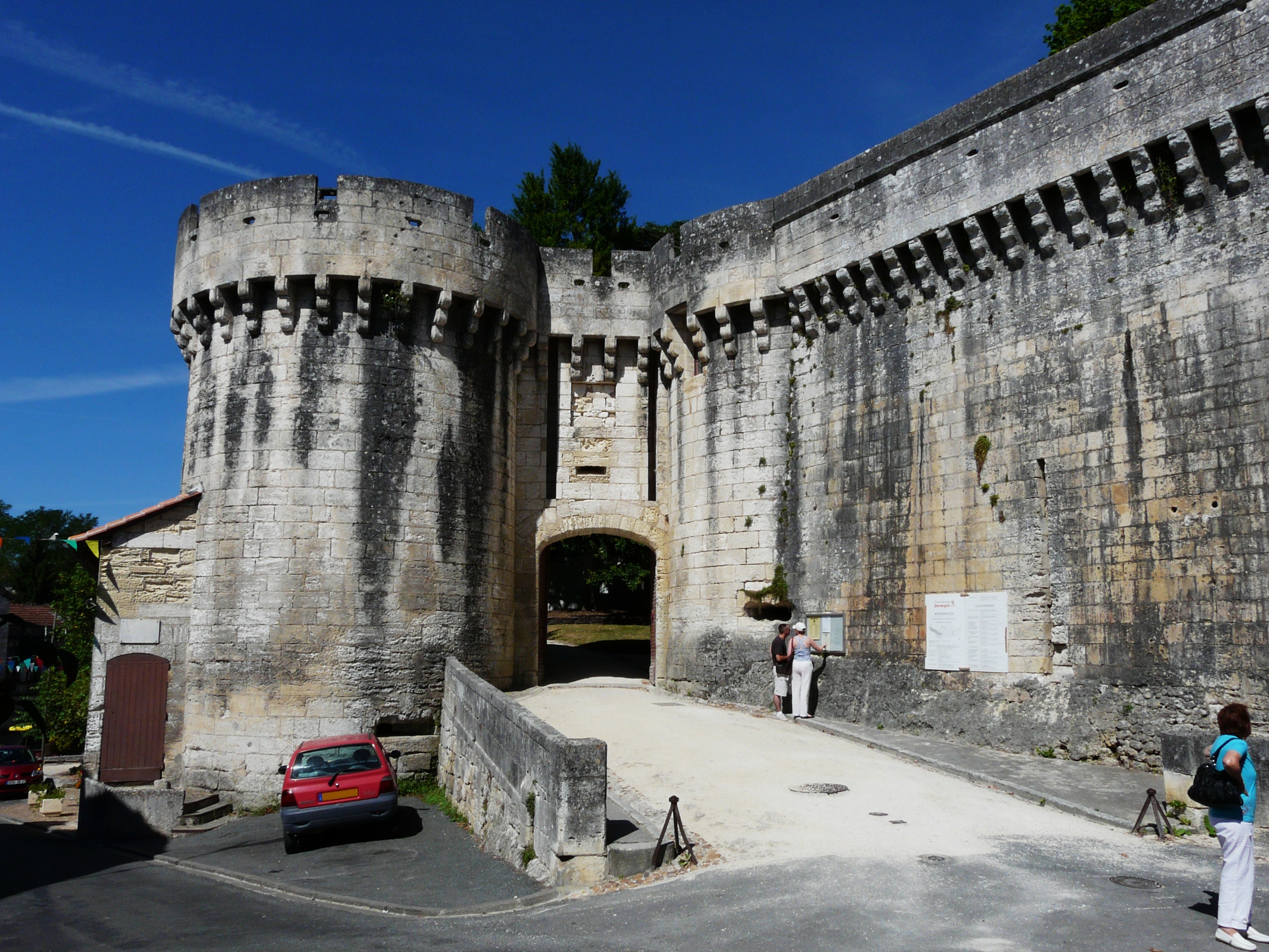 L'entrée du château de Bourdeilles, Dordogne, France